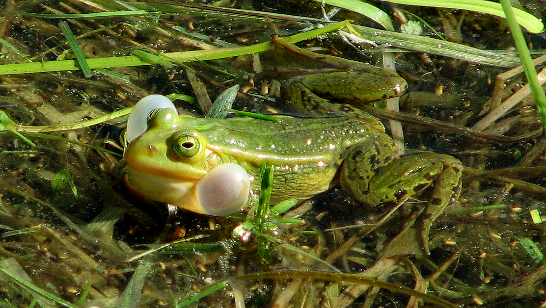 Tiigikonn